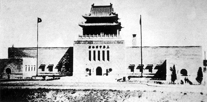 中文（中国大陆）: 上海市博物馆旧影，摄于1936-1937年战前